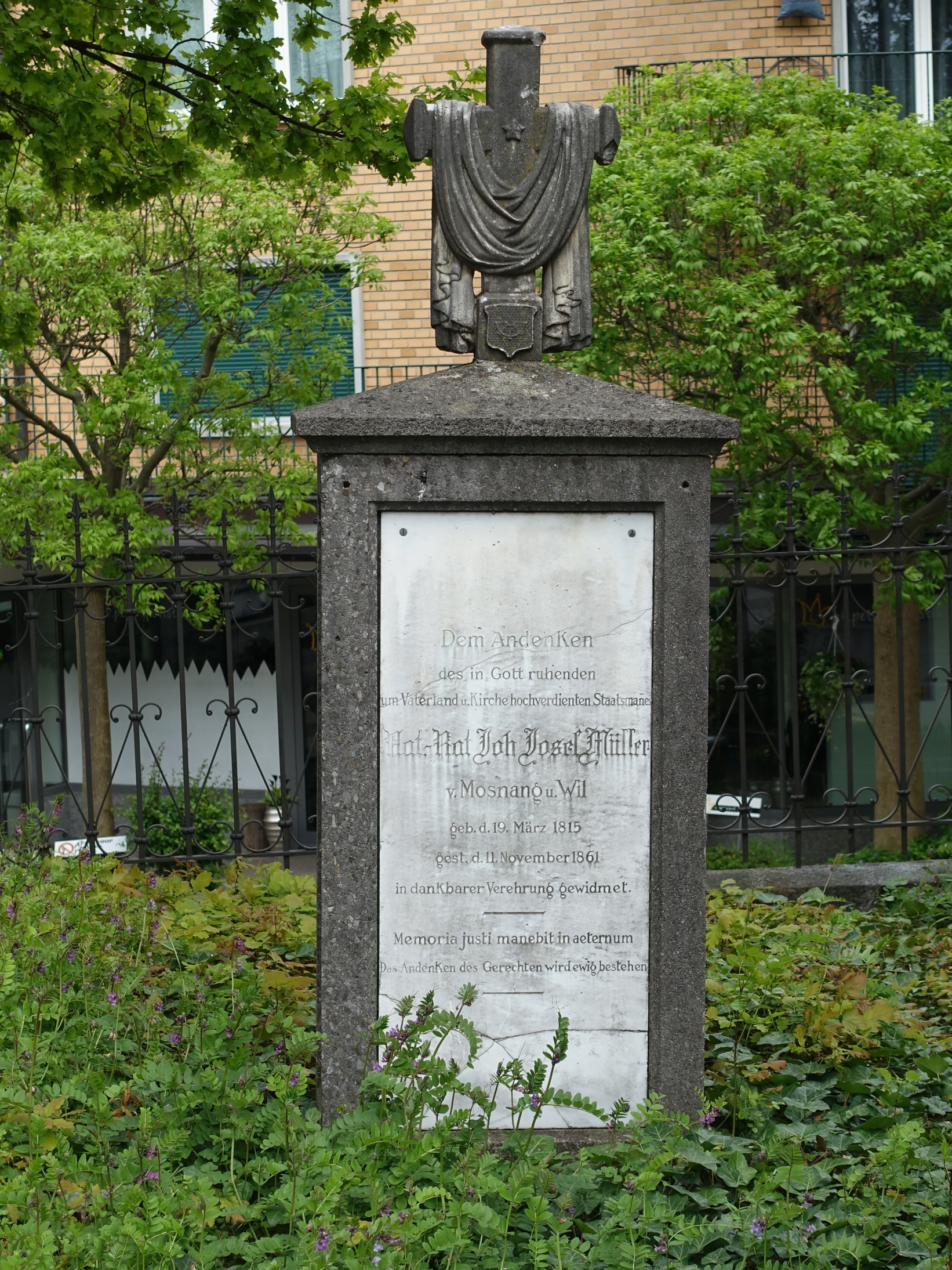 Grabstein von Johann Joseph Müller (1815–1861) Politiker, Unternehmer, Journalist bei der Kirche St. Peter, Wil, St. Gallen.